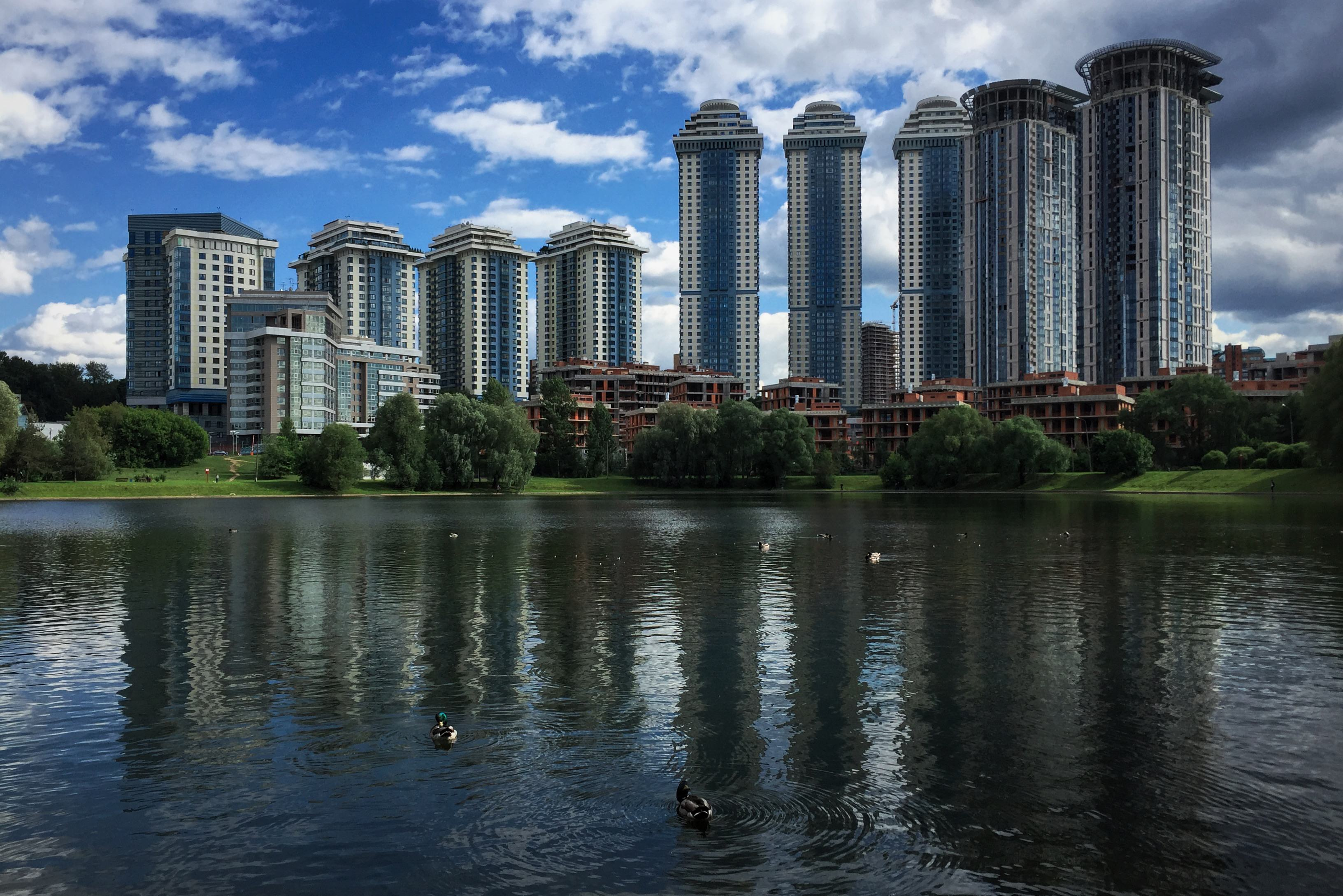 Улица Улофа Пальме. Мосфильмовский пруд Moscow in 2016; Москва в 2016